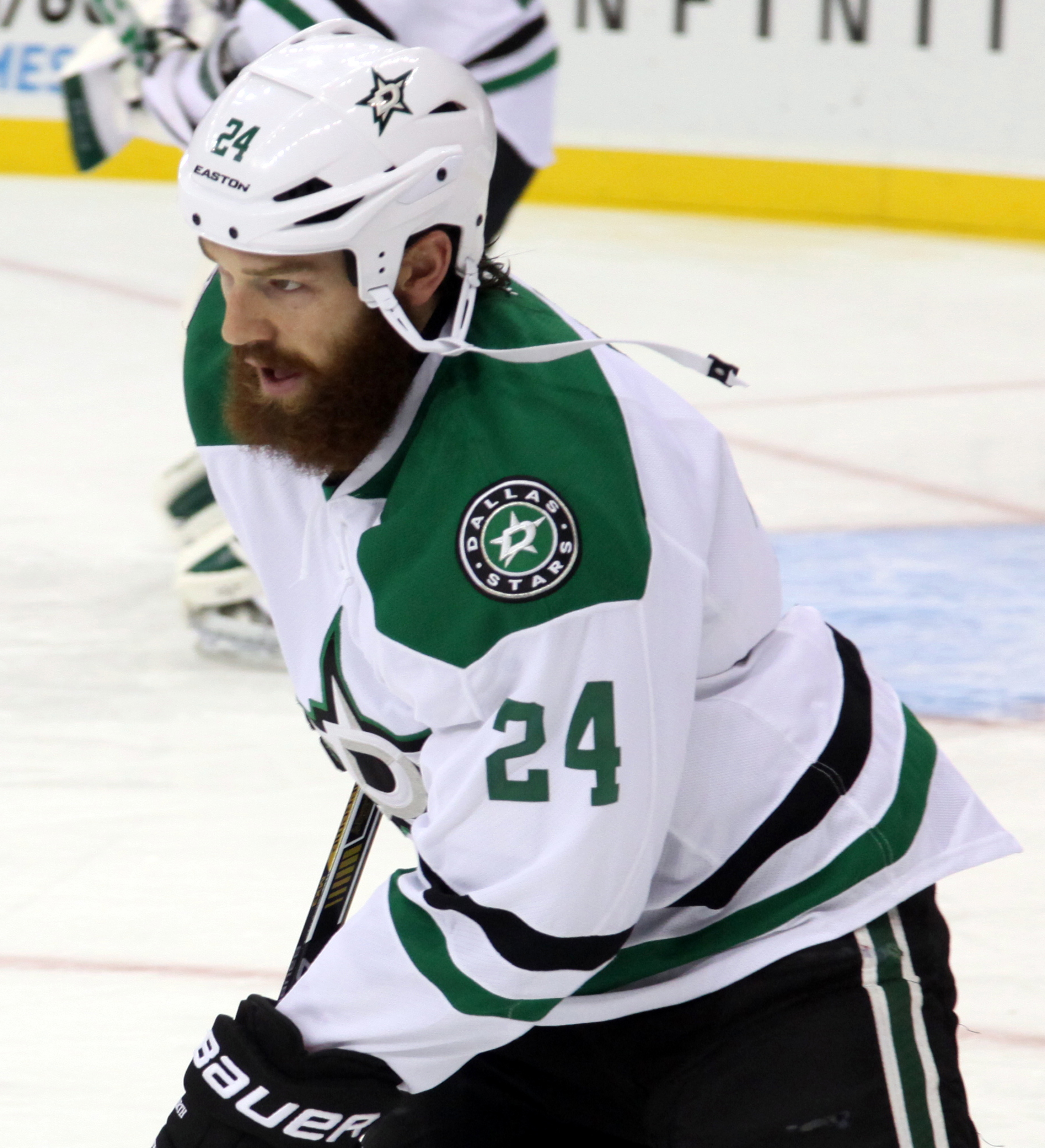 Benn in October 2014.